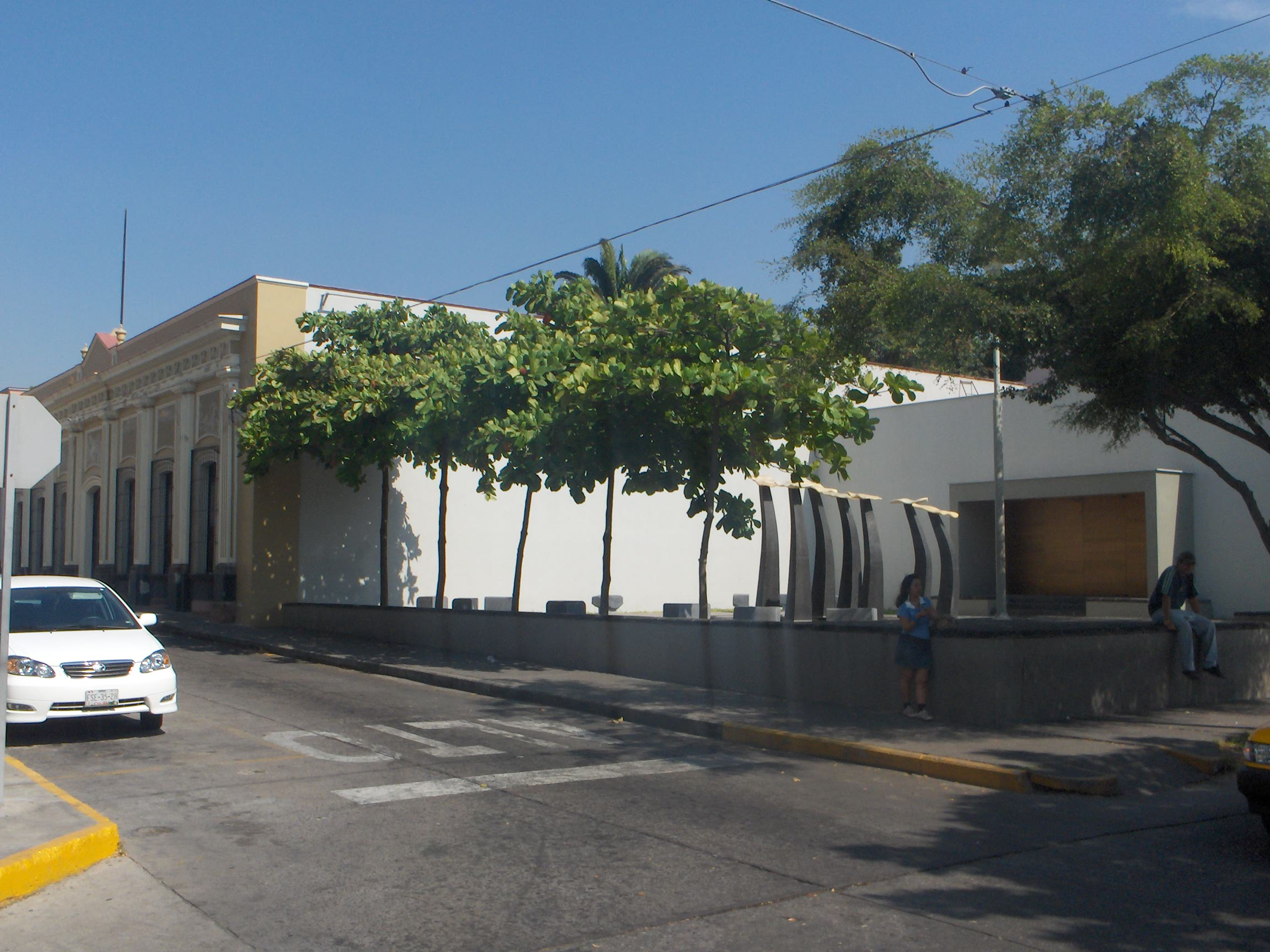 Pinacoteca Colima